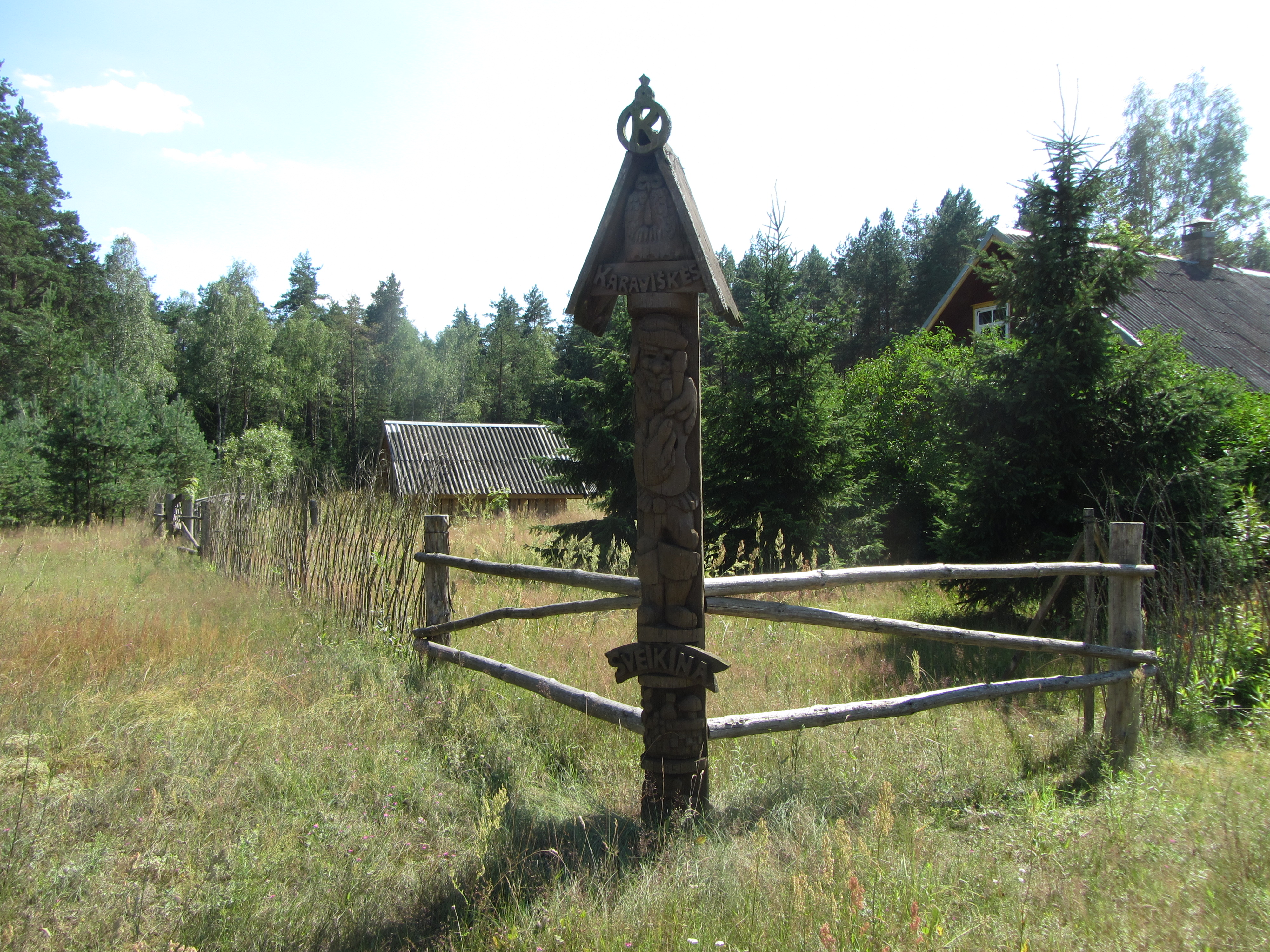 Kaniavos sen., Lithuania